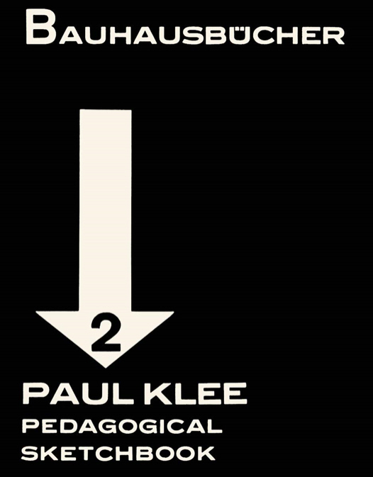 Titelumschlag der englischen Übersetzung "Pedagogical Sketchbook" von Paul Klee, Titelgestaltung durch László Moholy-Nagy